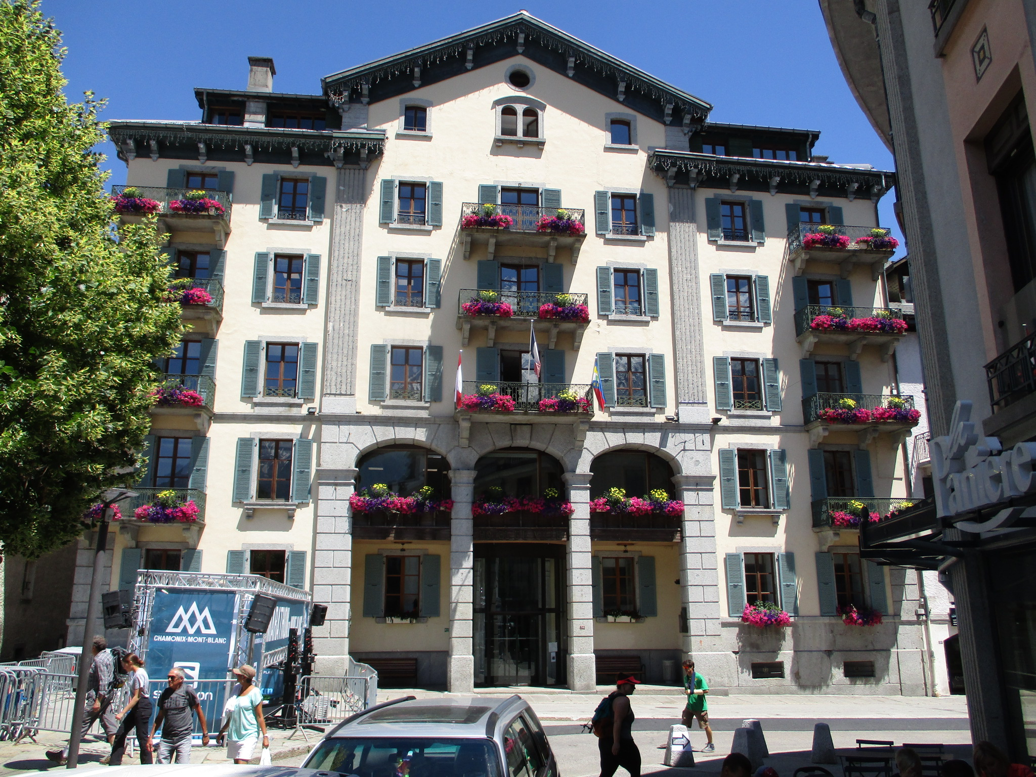 Streets in Chamonix